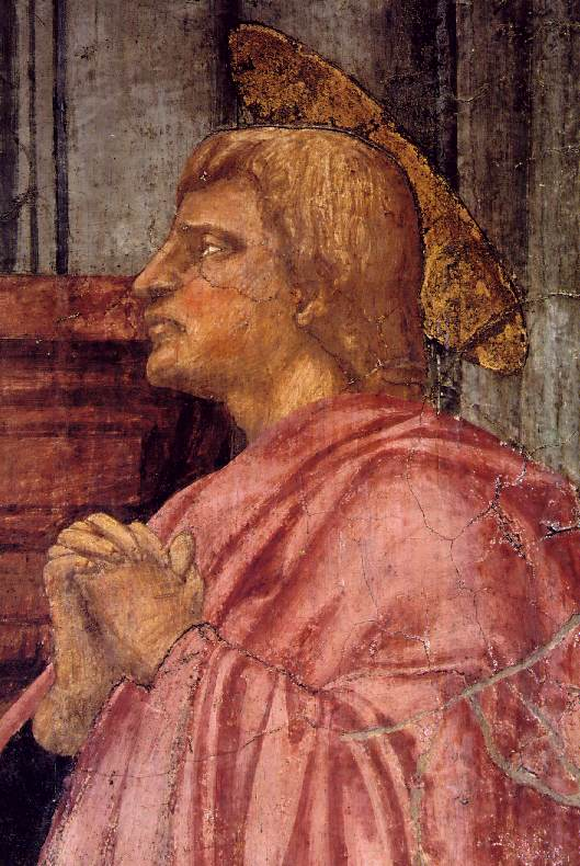 detail